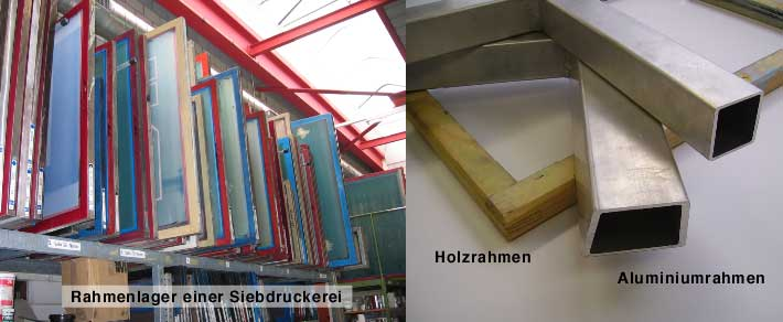 Schablonenrahmen Siebdruck